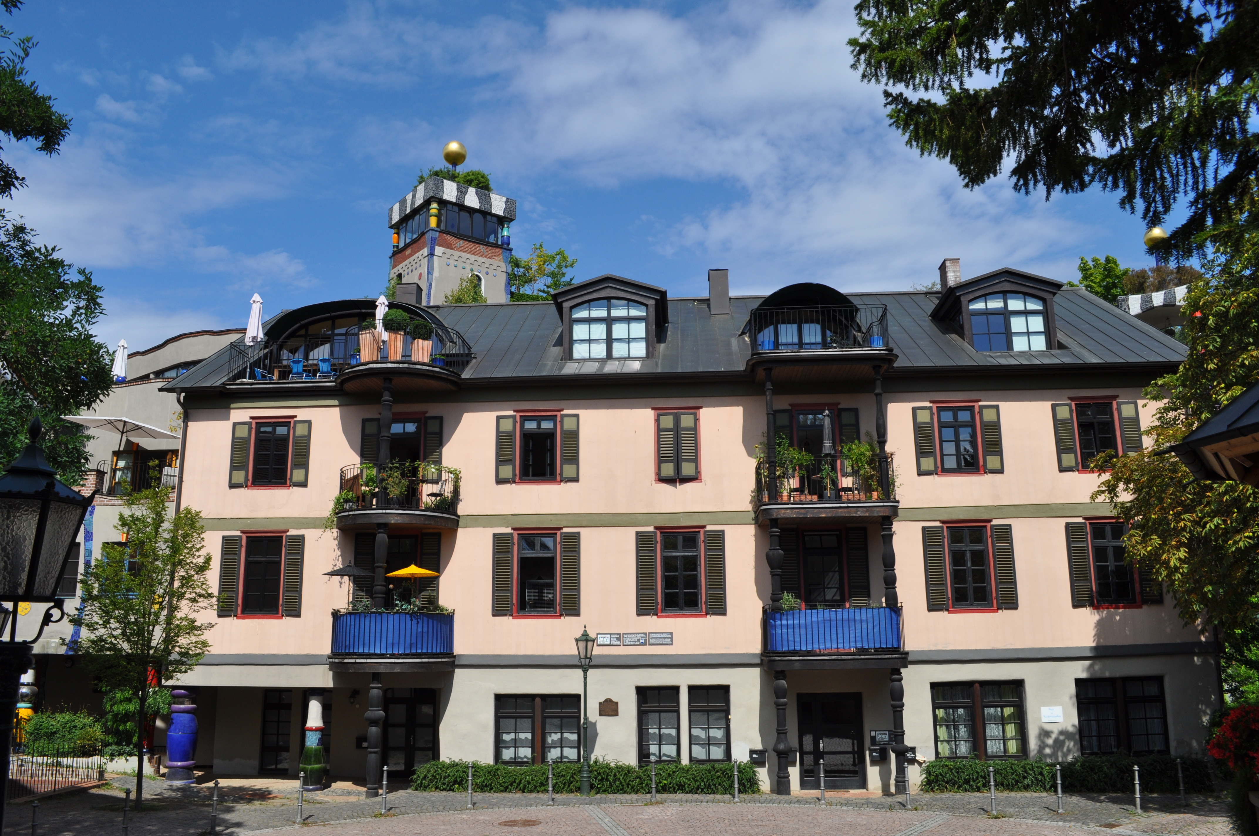 Das erste Kurhaus in Bad Soden, erbaut 1722